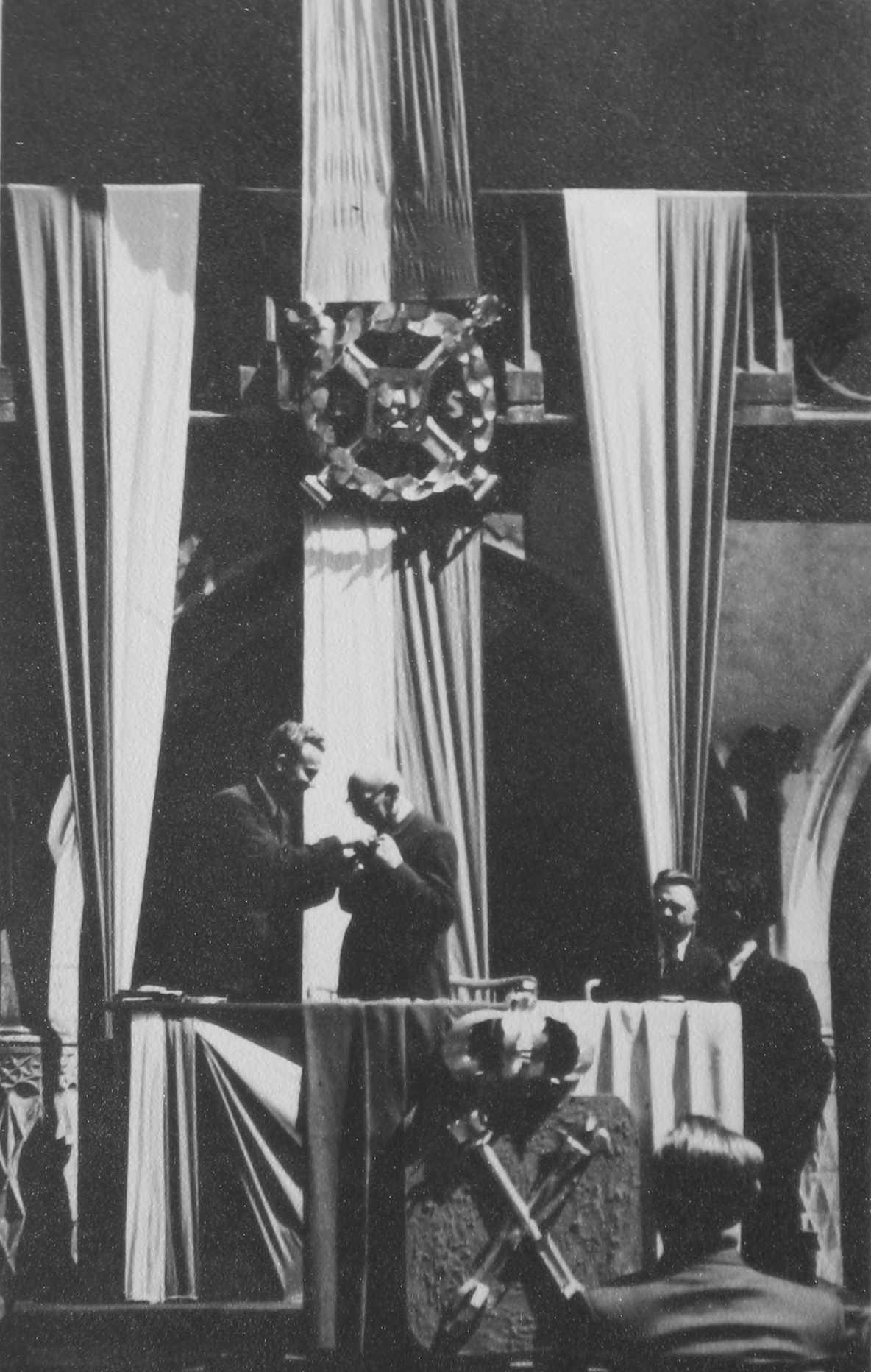 Uroczystość Bratniej Pomocy Studenckiej na Uniwersytecie Jagiellońskim, maj 1947. Od lewej: Jan Deszcz (prezes Bratniaka) wręcza odznaczenie prof. Stanisławowi Pigoniowi (opiekunowi organizacji), następny twarzą do aparatu nieznany uczestnik, na skraju bokiem do aparatu z twarzą w cieniu Henryk Zieliński (wiceprezes Bratniaka); na pierwszym planie tyłem do aparatu osoba nieznana